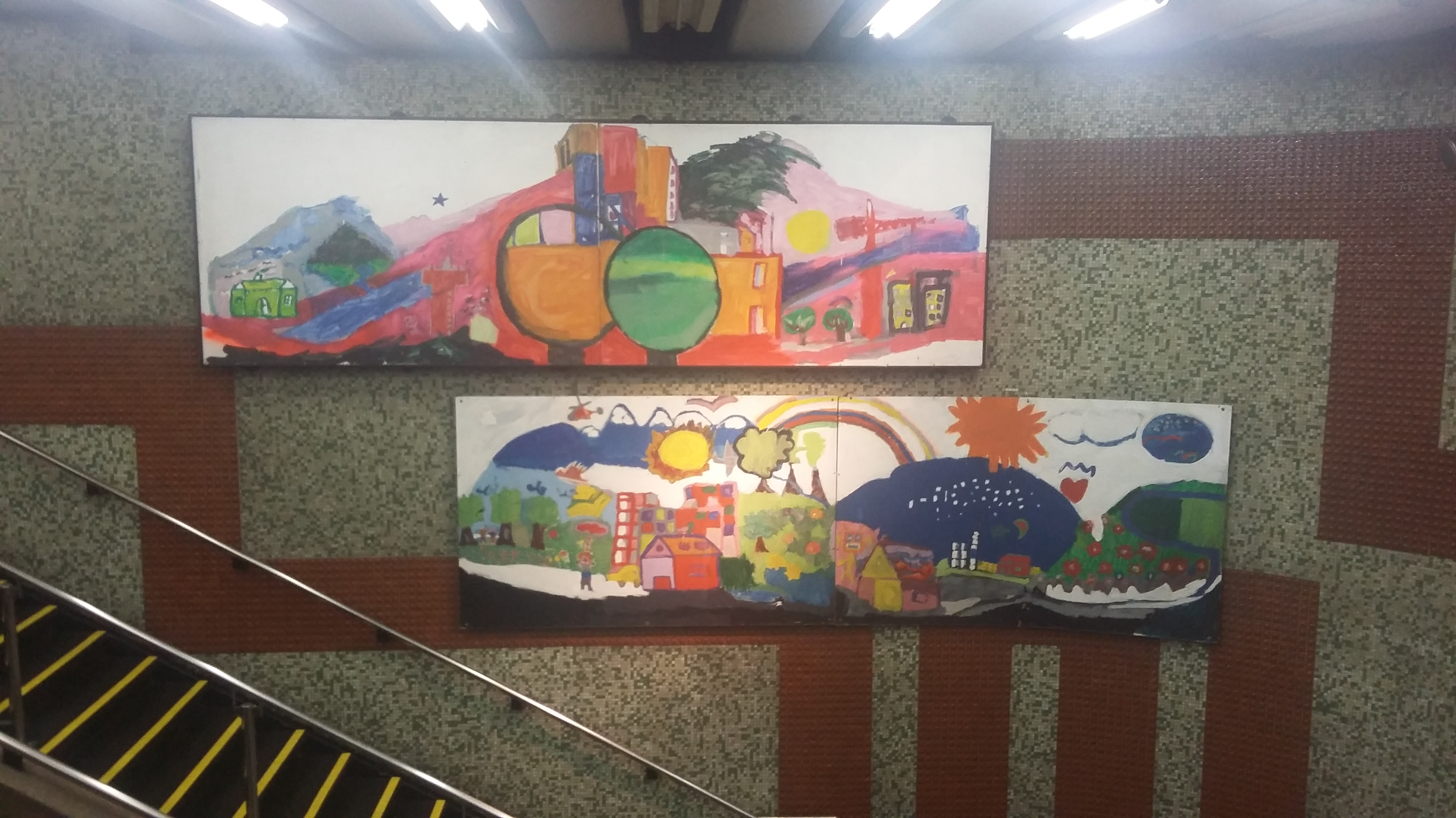 Obras realizadas por los niños